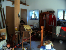 Blick in die Weihnachtsstube des Himmelpforter Weihnachtsmanns